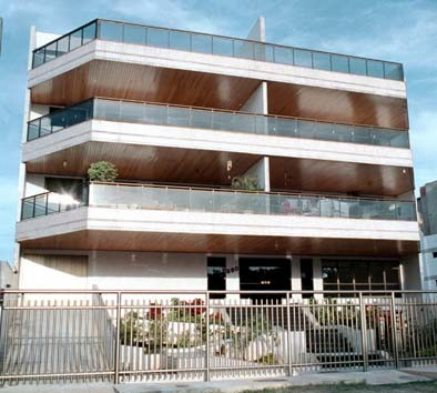 Habitations typique sur la plage de Recreio dos Bandeirantes.